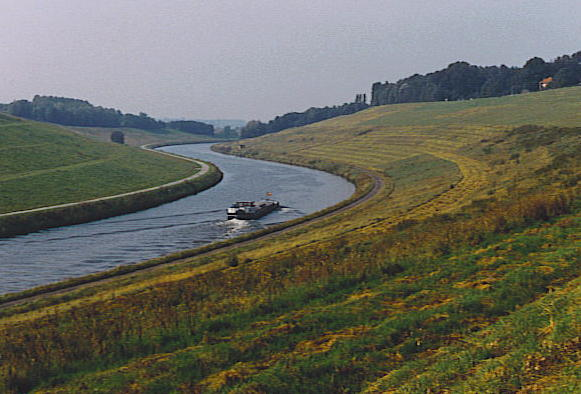 propre photo